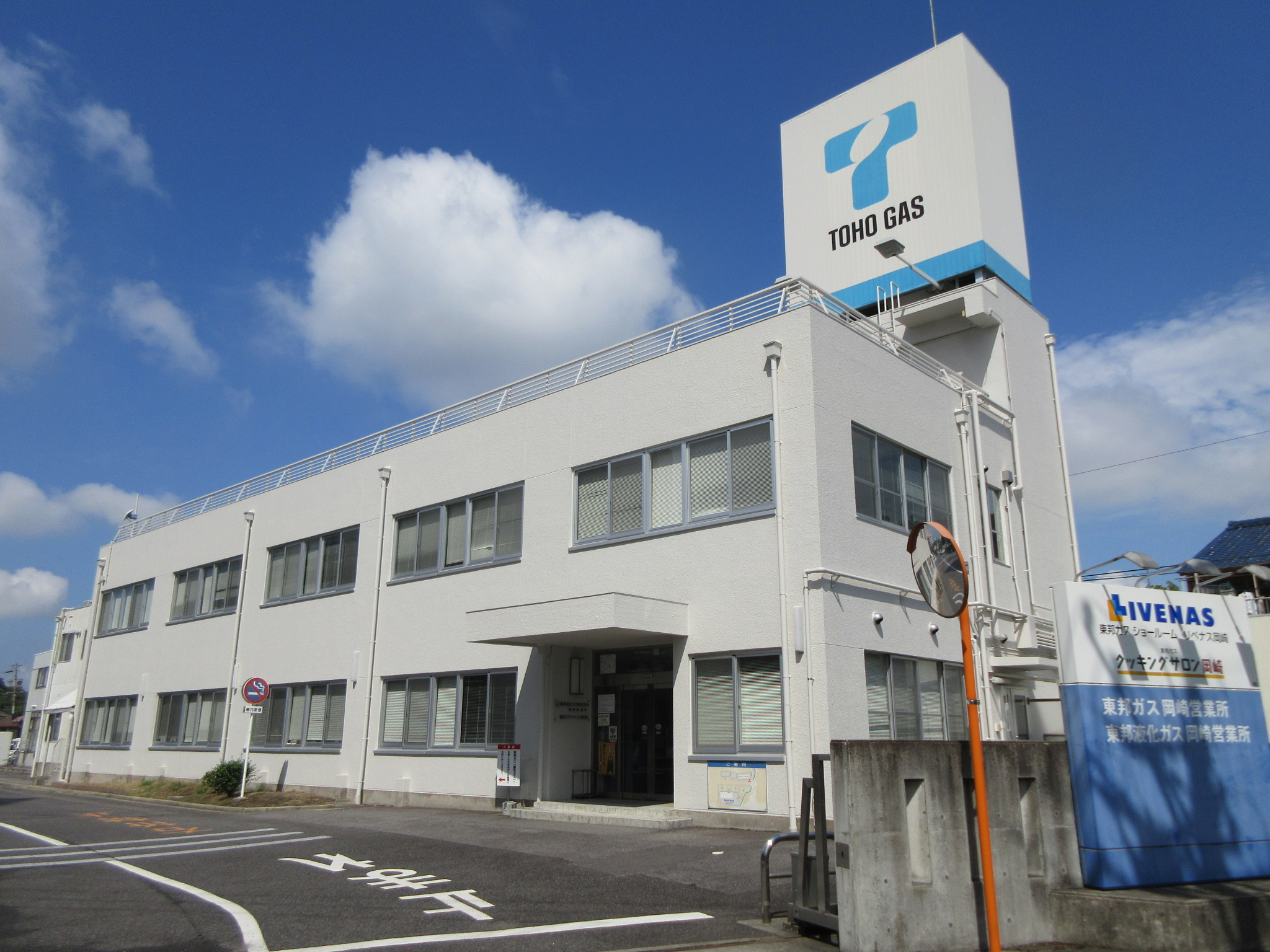 東邦ガス岡崎営業所